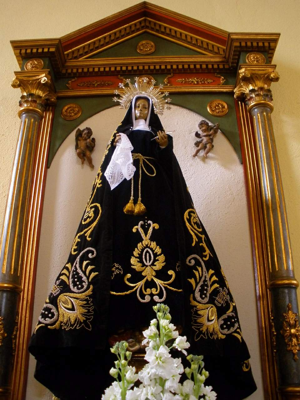 Blimea (San Martín del Rey Aurelio, Asturias) - Iglesia de Santa María de las Nieves